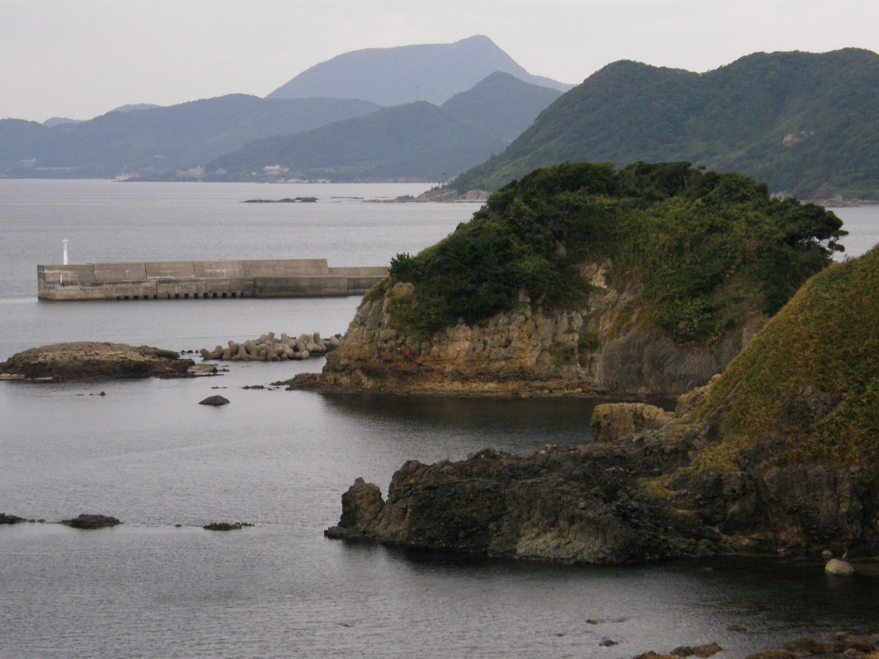 Amanohashidate-Kasamatsu Park 2010-10-02 Tango peninsula Asamogawa-Amino 浅茂川漁港を望む